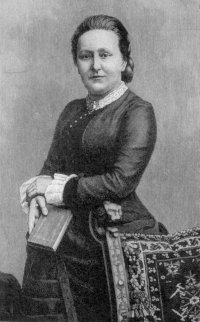 Elisabeth Bürstenbinder, (* 25. November 1838 Berlin; † 10. Oktober 1918 Schloss Labers Meran) german author (pseudonym: E. Werner)